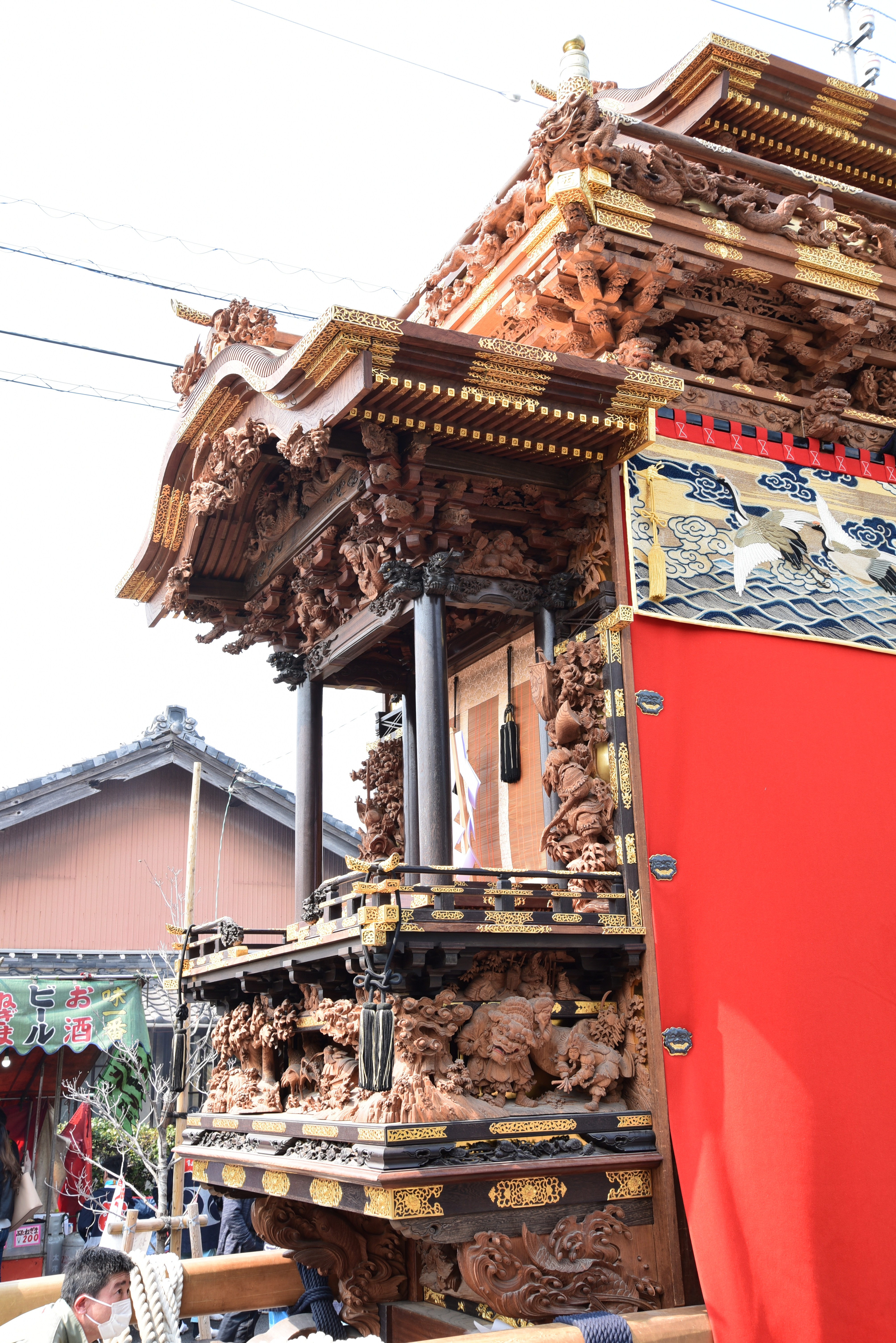 愛知県半田市の乙川祭禮。西山神楽車の彫刻